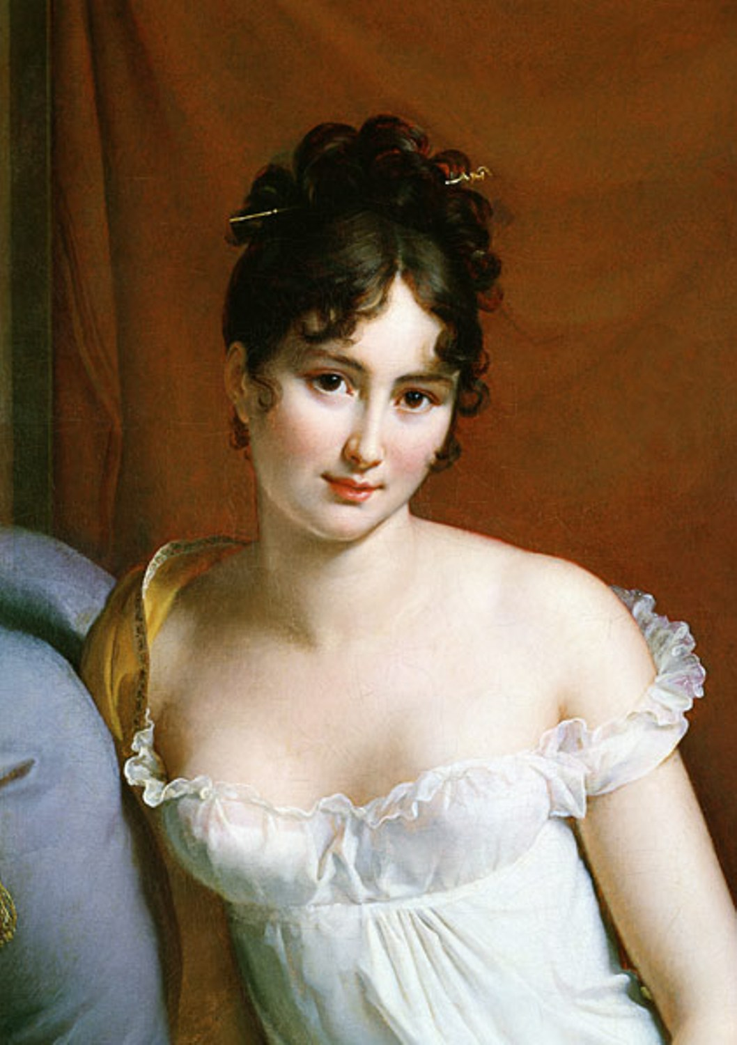 Juliette Récamier, femme d'esprit, célèbre pour sa beauté et muse du poète François-René de Chateaubriand (1768-1848).